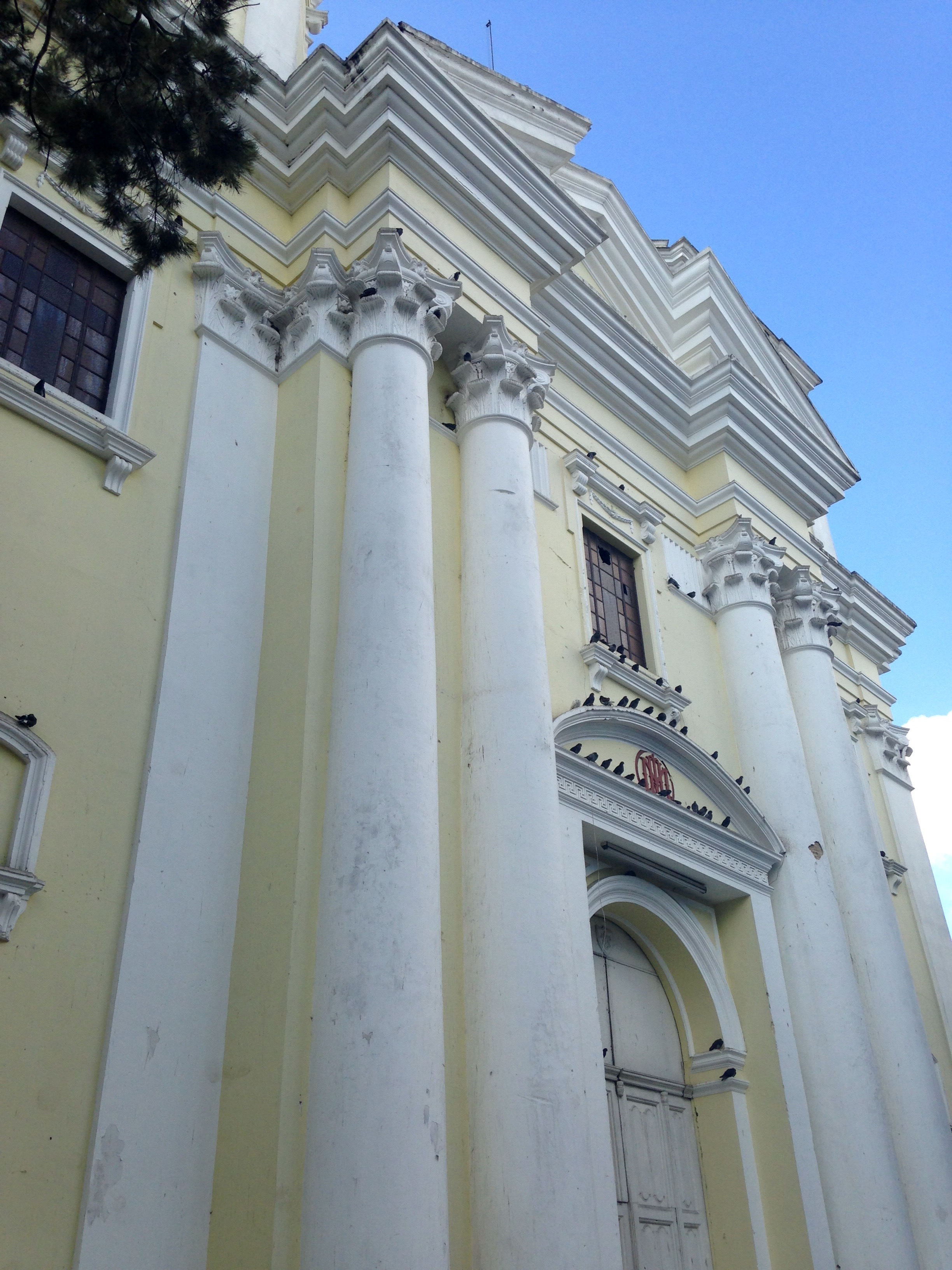 Fachada de la Parroquia del Santísimo nombre de Jesús, templo de la Recolección. Ciudad de Guatemala, 2016